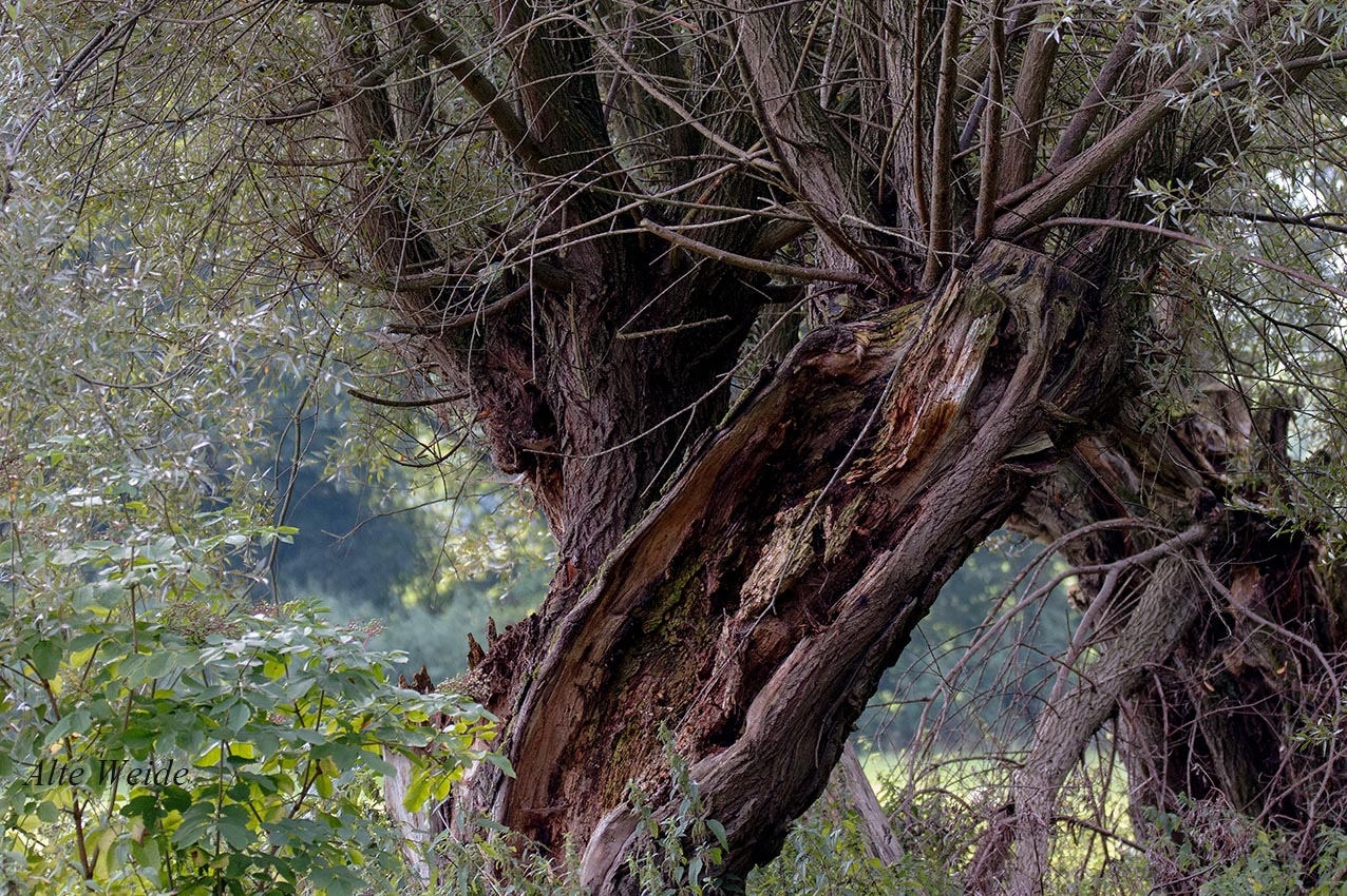 Alte morsche Weide